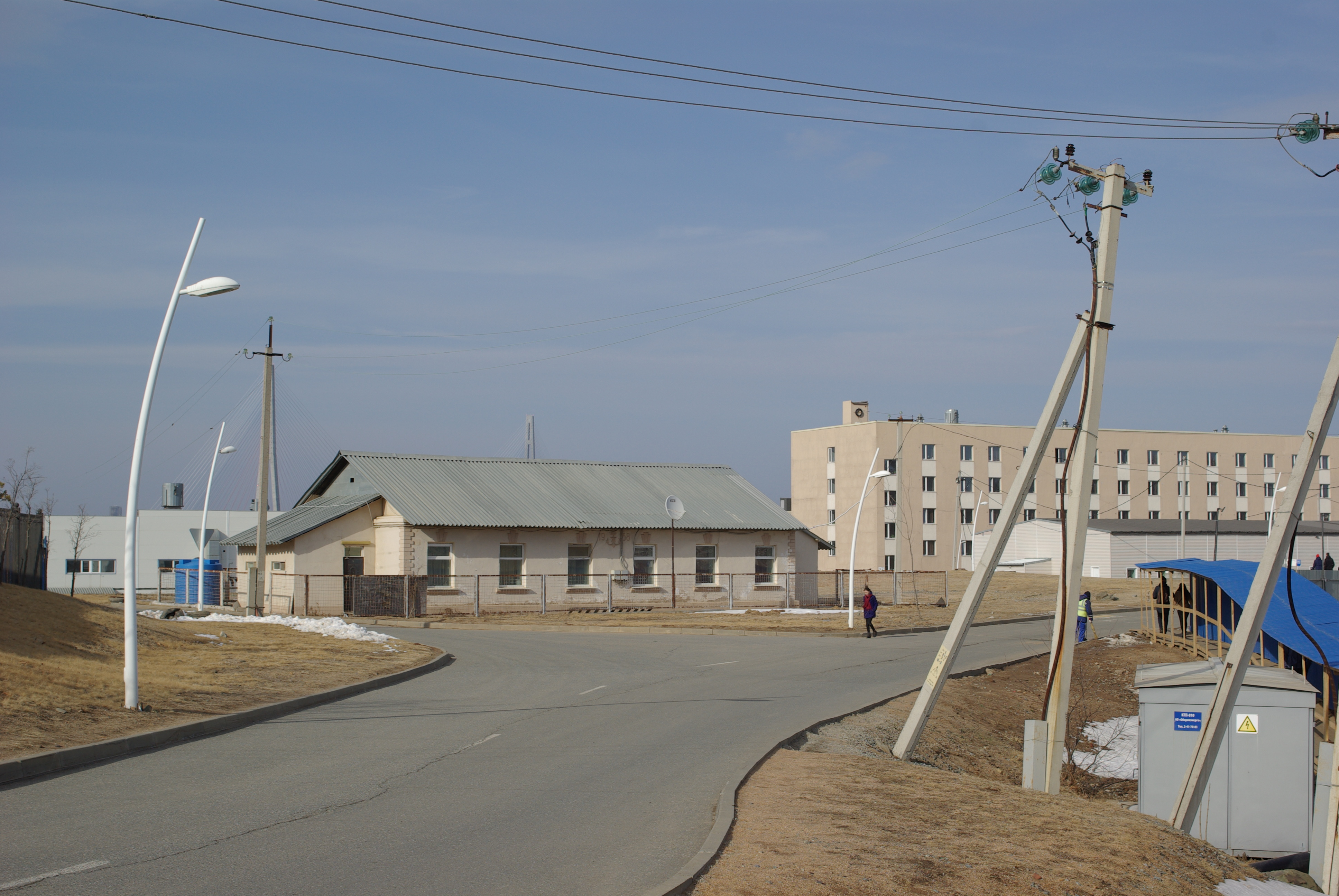 Кампус ДВФУ